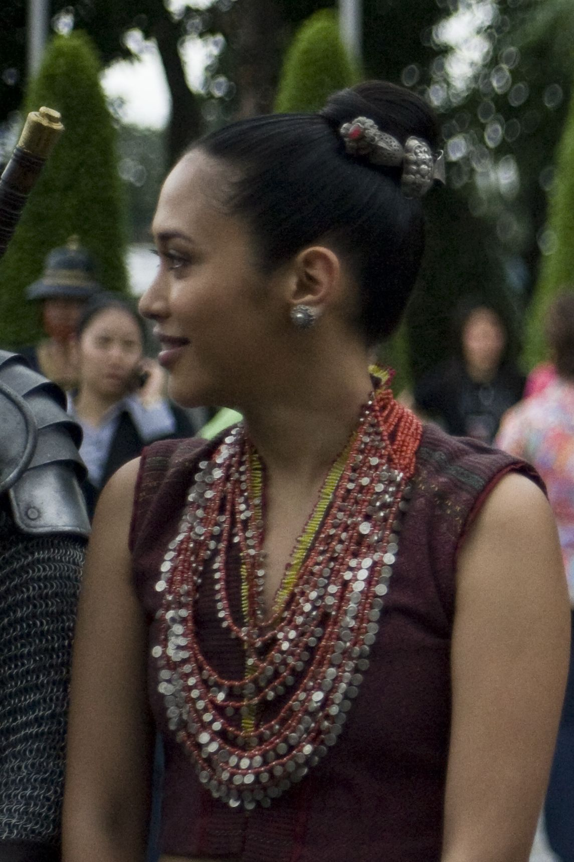 อินทิรา เจริญปุระ (เลอขิ่น) / นายกรัฐมนตรี แถลงข่าวรัฐบาลสนับสนุนการสร้างภาพยนตร์ตำนานสมเด็จพระนเรศวรมหาราช ภาค 3 และ 4 "สงครามยุทธหัตถี" ณ ศูนย์วัฒนธรรมแห่งประเทศไทย 8สิงหาคม2552 (The Official Site of The Prime Minister of Thailand Photo by พีรพัฒน์ วิมลรังครัตน์)